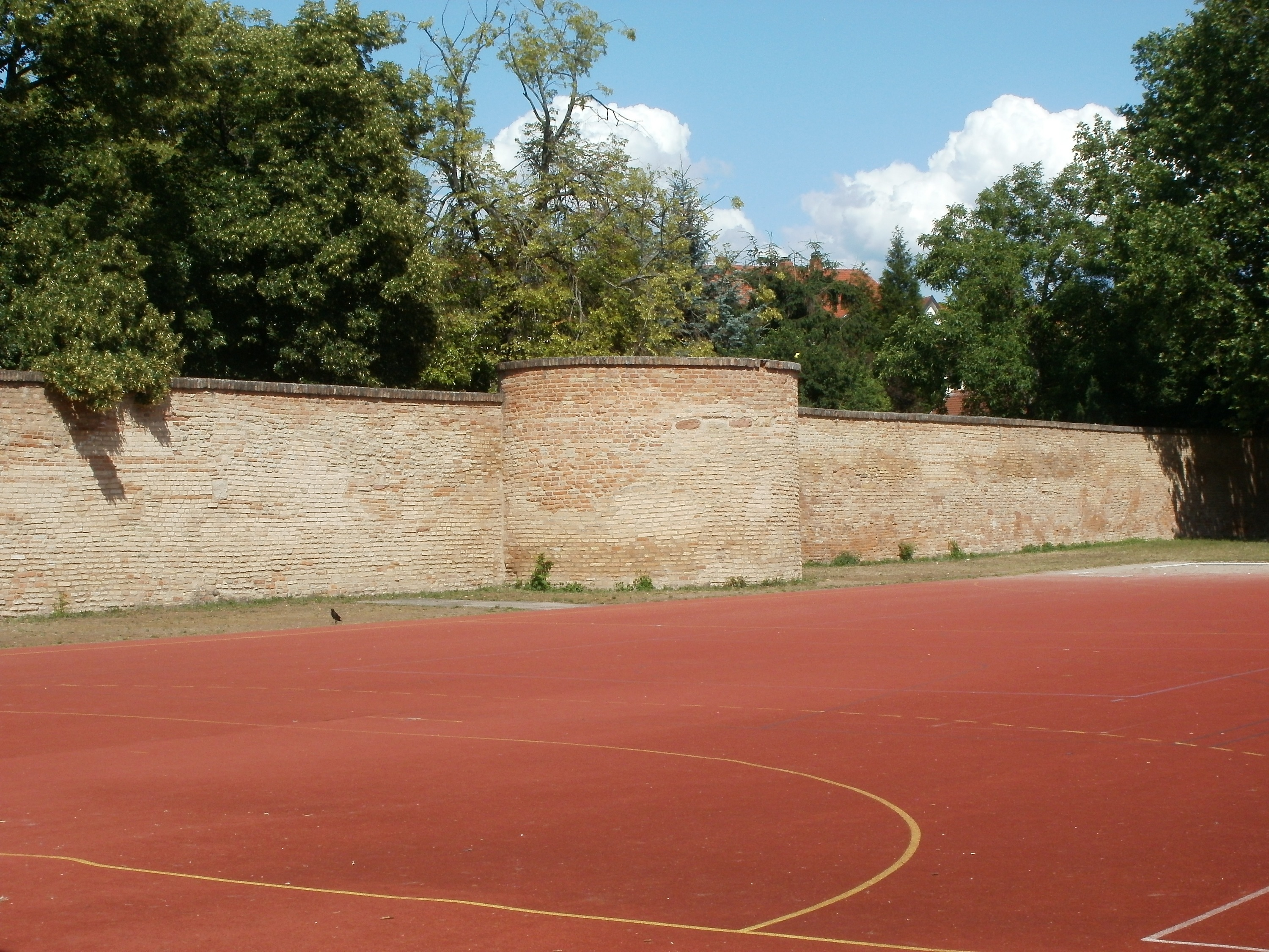 Stadtmauer an der Hilgradstraße (Speyer)